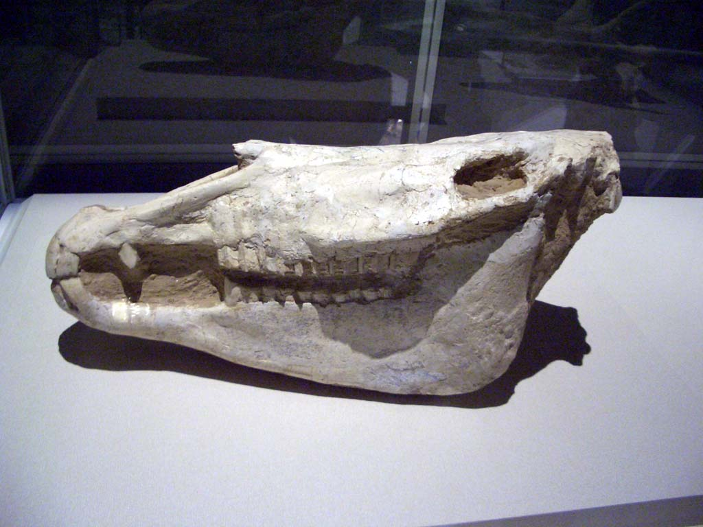 Equus eisenmannae skull displayed in Hong Kong Science Museum